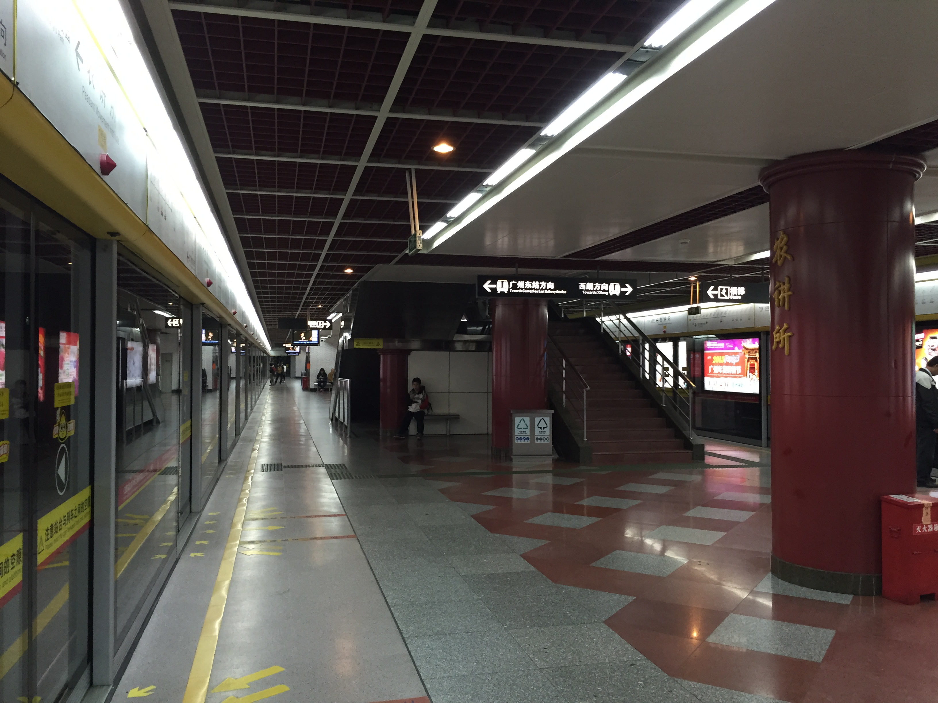 广州地铁农讲所站